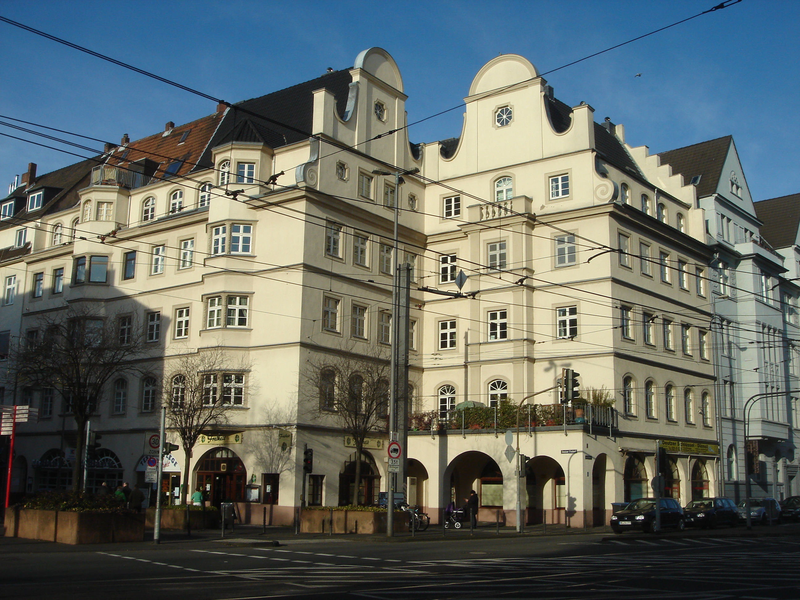 Wohn- und Geschäftshaus, Justinianstr. 1, Gebäude von Architekt Wilhelm Riphahn (Frühwerk), an der Einkaufsstraße "Deutzer Freiheit" (Ostseite)